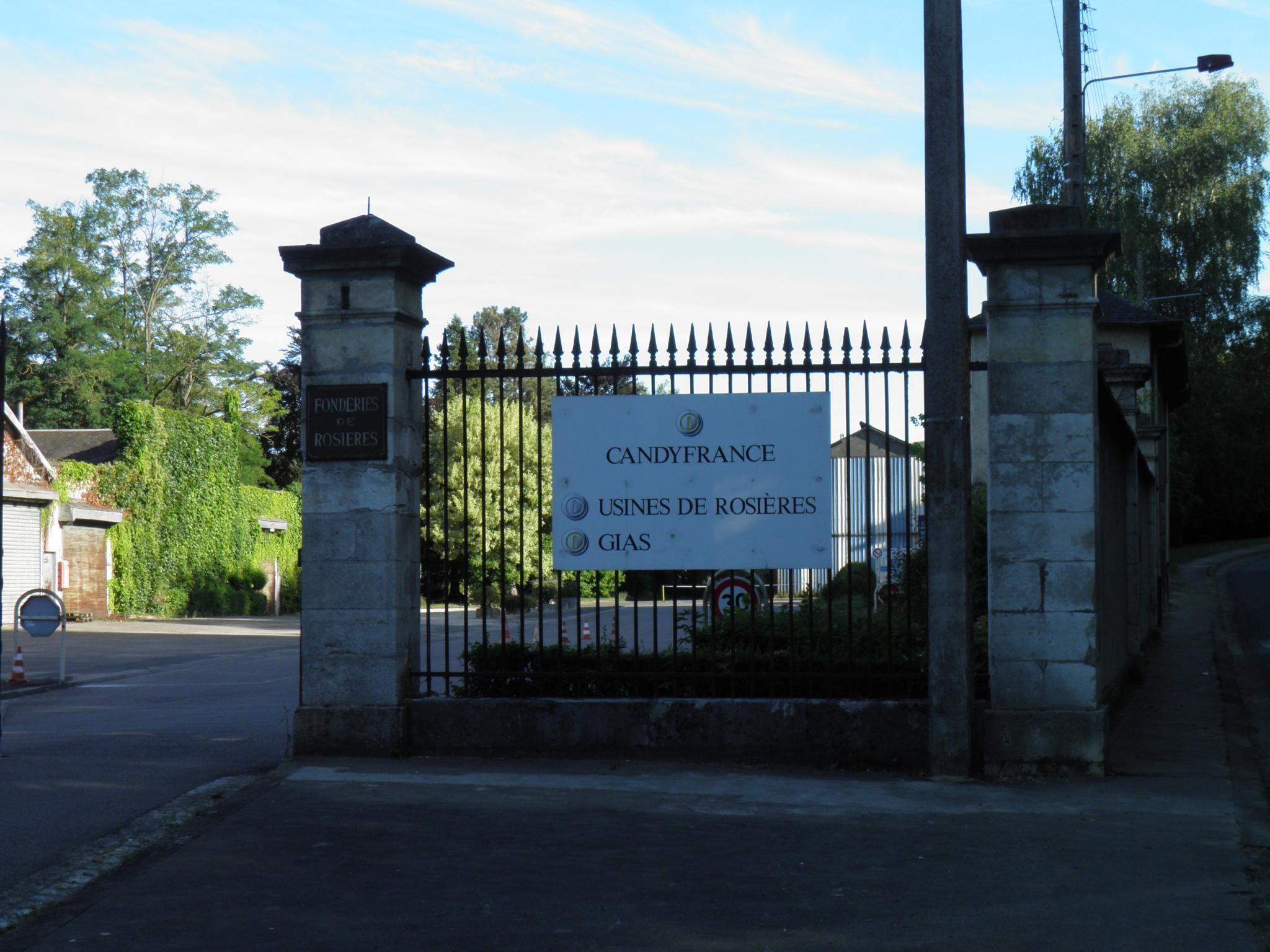 Panneau à l'entrée de l'usine de Rosières. Le groupe Rosières est racheté par l'Italien Candy en 1987. La fonderie est fermée en 2006, il ne reste plus sur place que des ateliers de montage propriété du groupe Candy-Hoover, racheté par le Groupe chinois Haier en 2018.